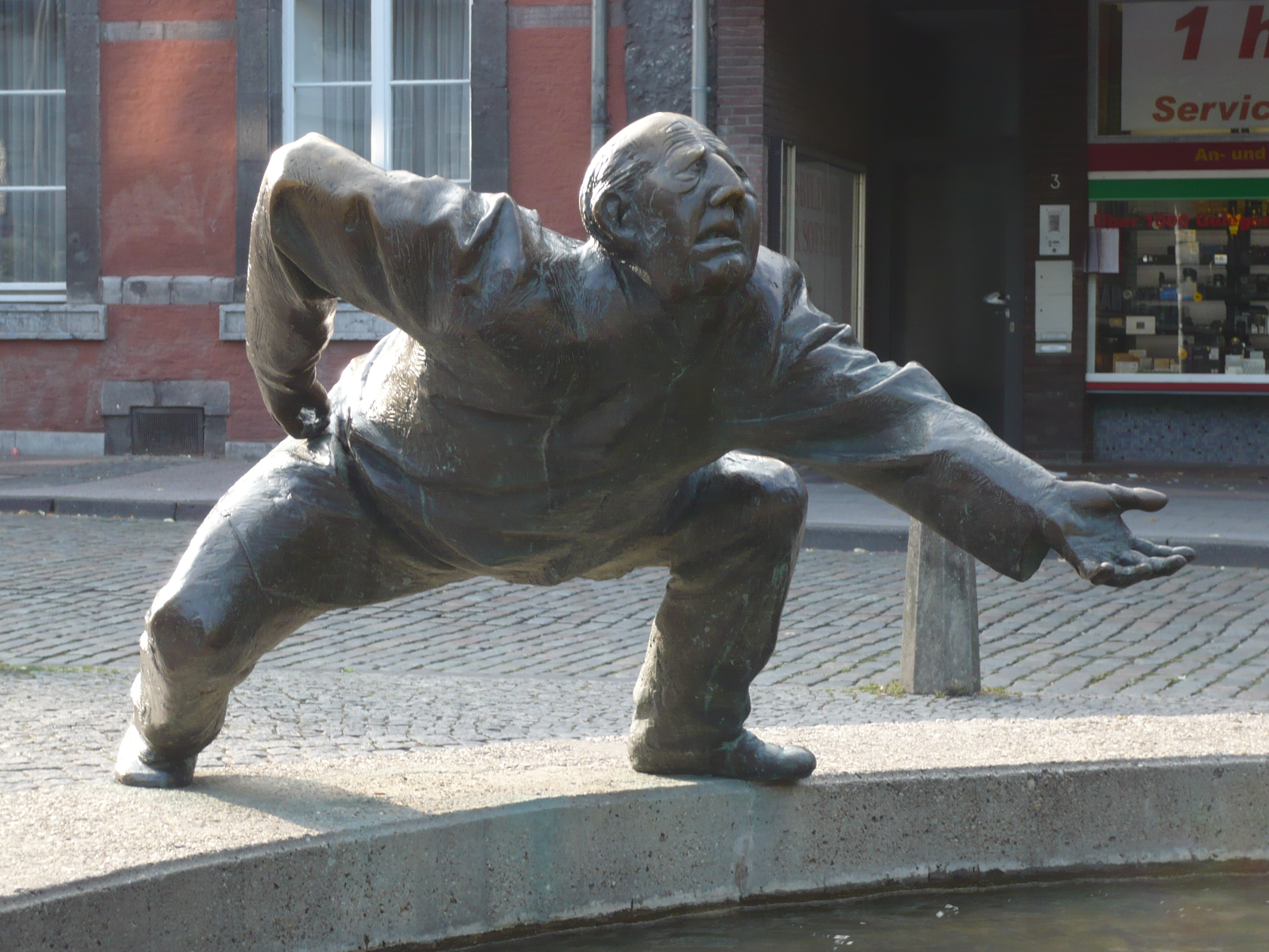 Kreislauf des Geldes, Brunnen in Aachen von Karl-Henning Seemann, Detail: Bettler